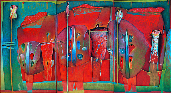 Maria Tomaselli Cirne Lima: "Três Semanas", 1993, acrílico sobre tela, tríptico. Acervo do Museu de Arte do Rio Grande do Sul Ado Malagoli